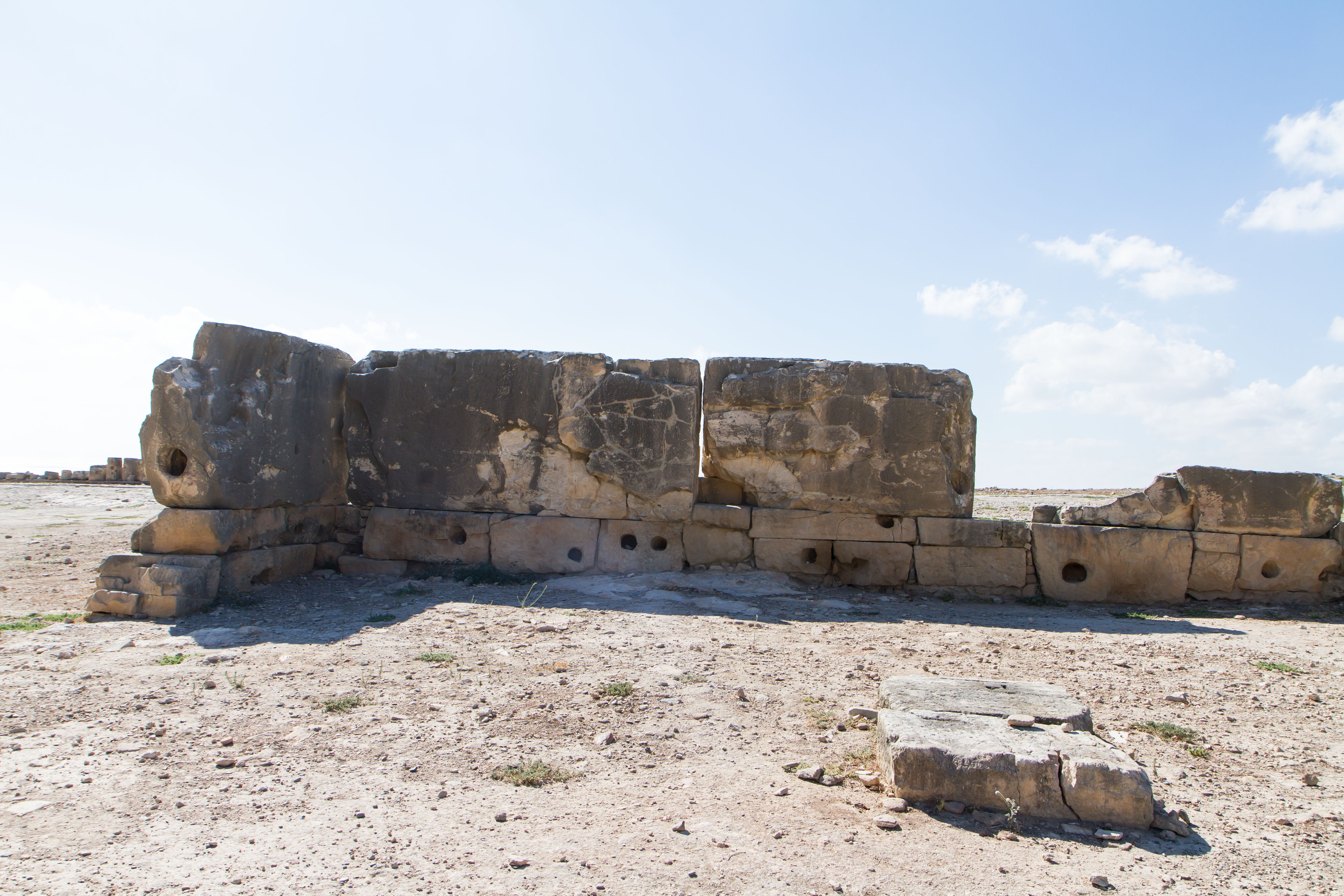 Kouklia, Cyprus